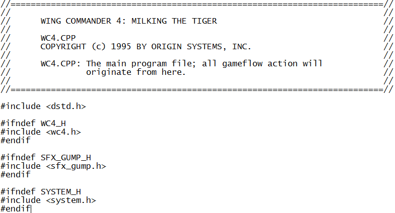 Wing Commander IV quelltext screenshot